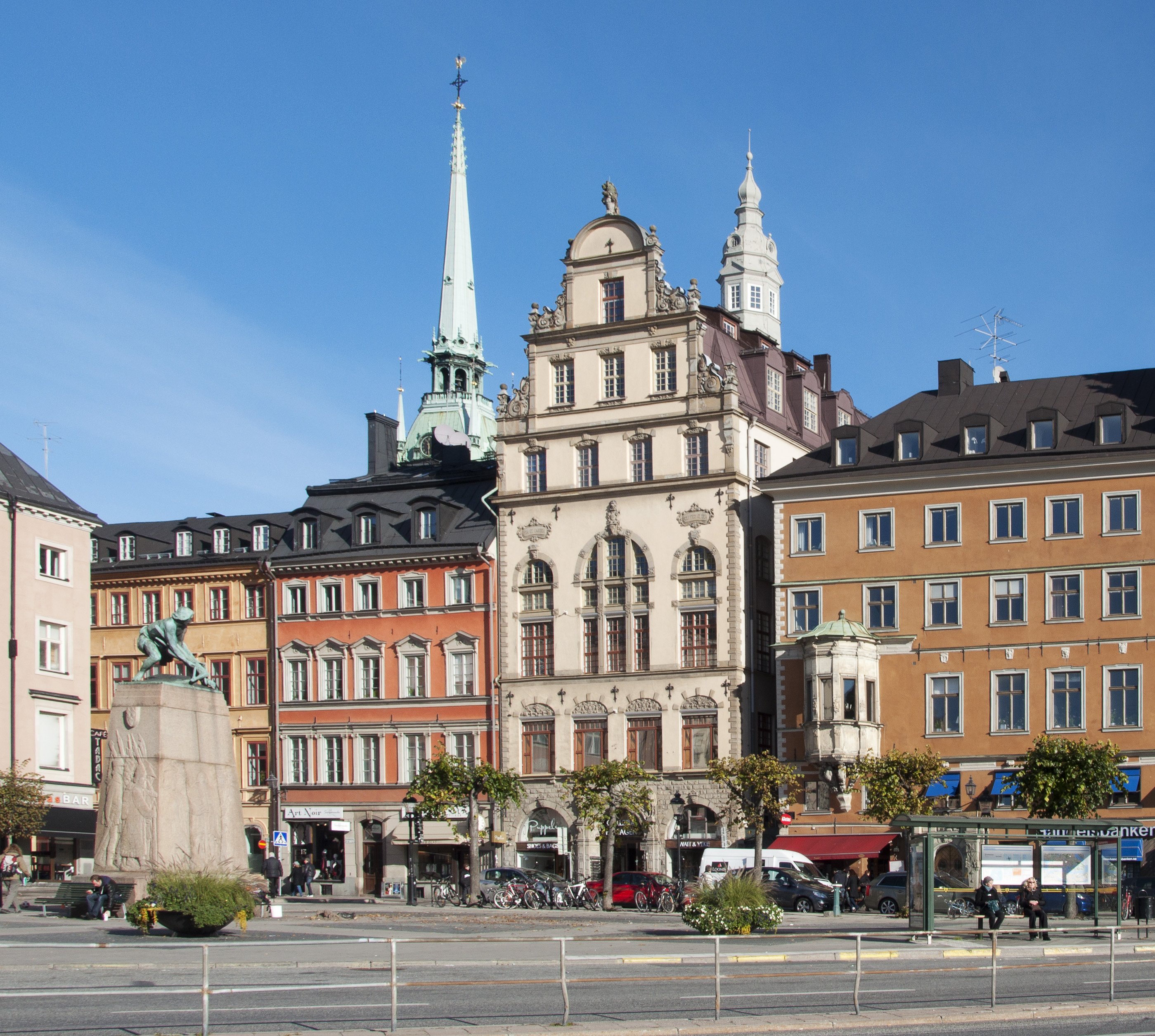 Kornhamnstorg 47-51